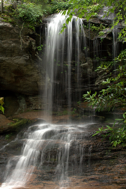 Window Falls in Hanging Rock State Park